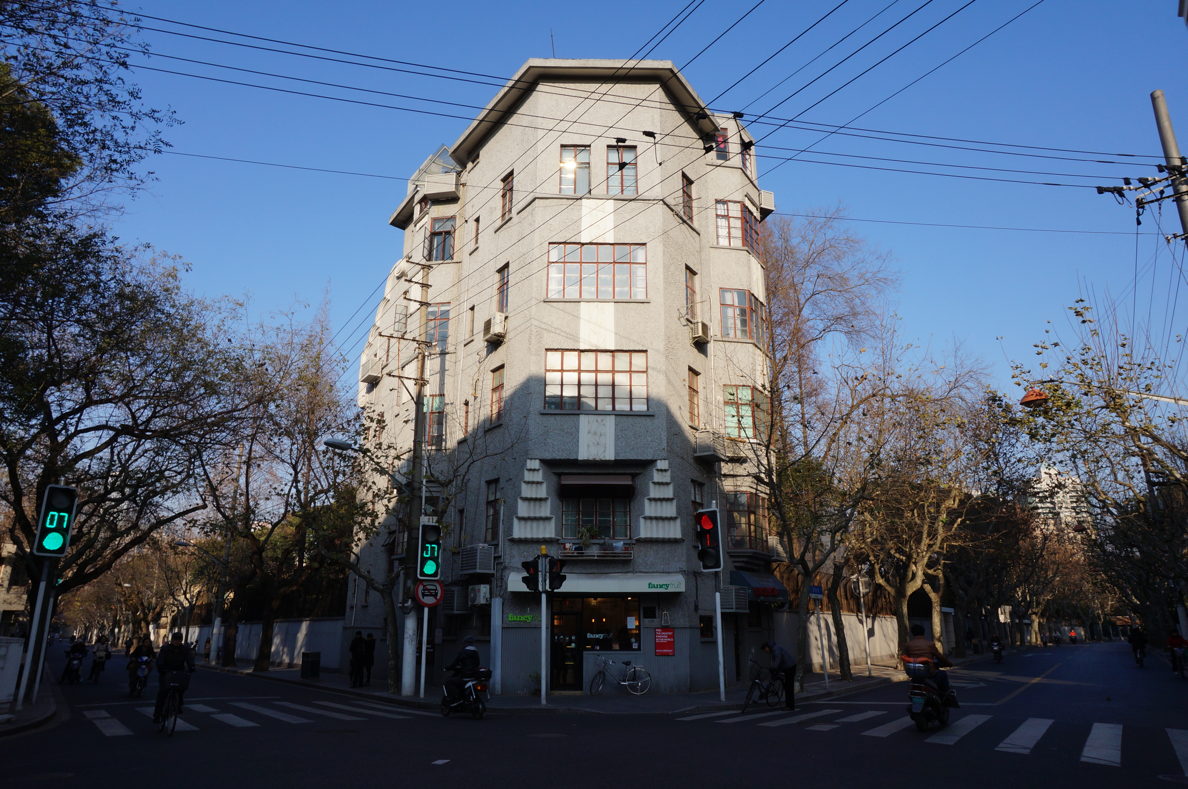 武康路密丹公寓